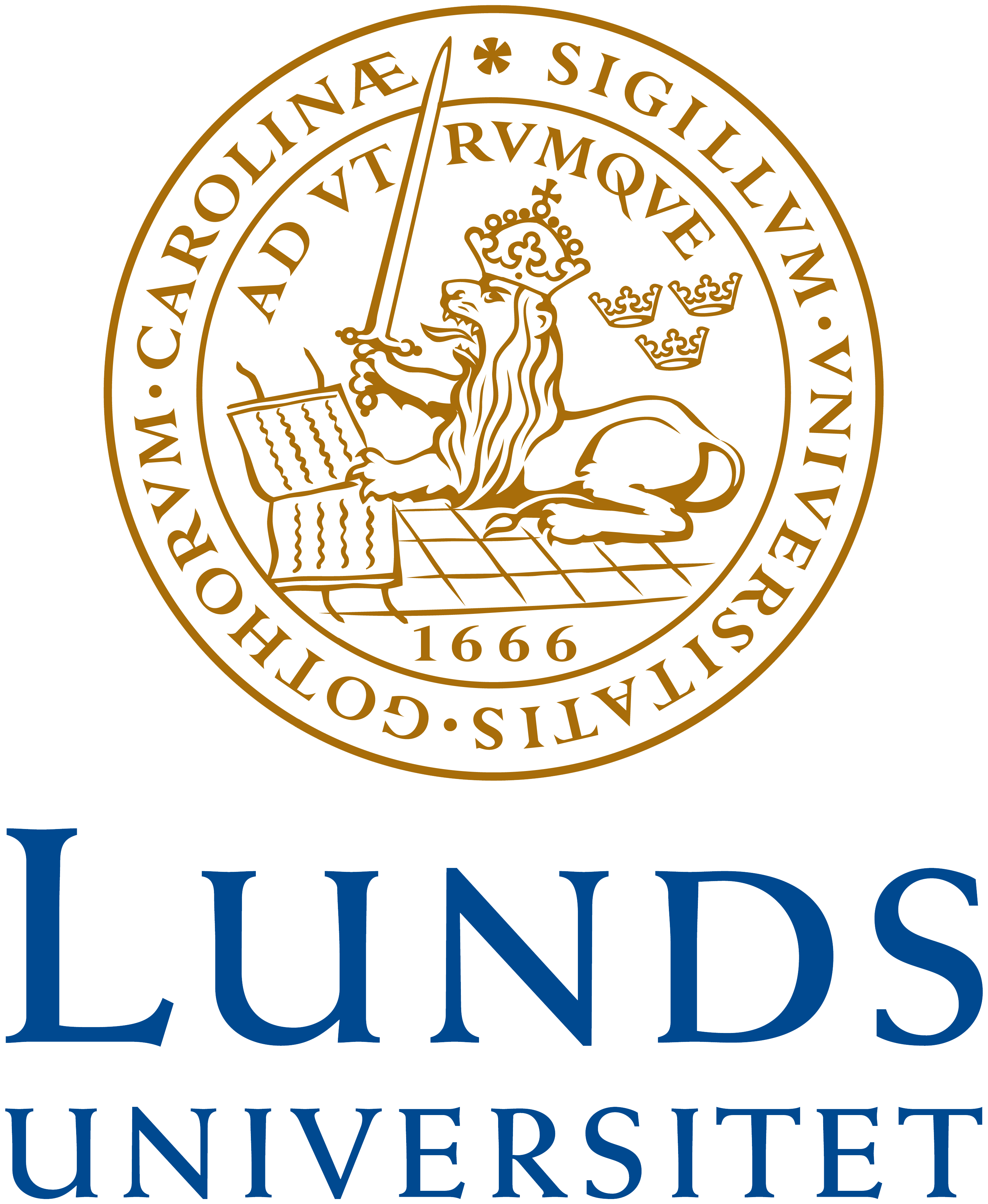 Lunds universitets logotyp (vit bakgrund)